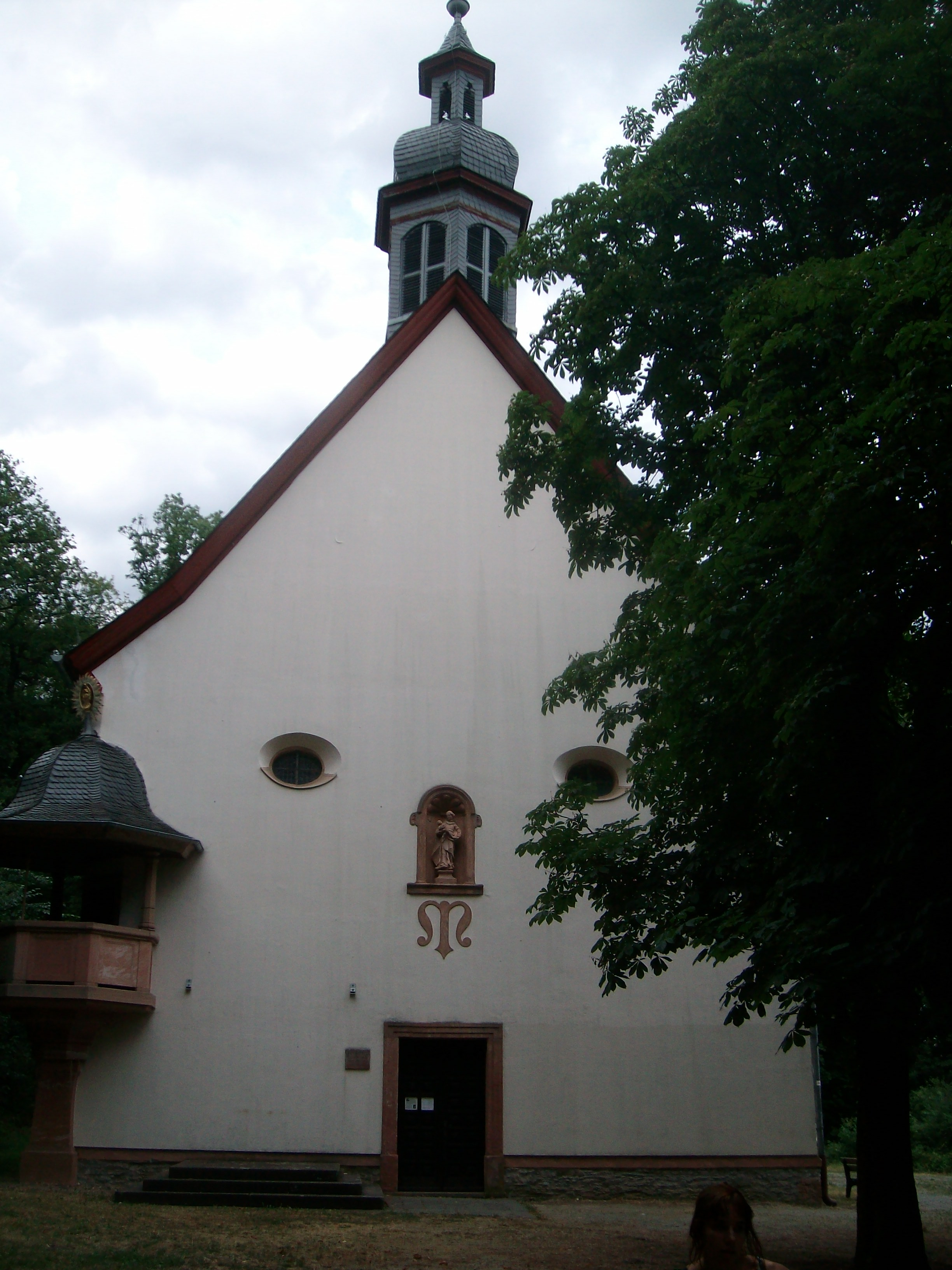 Die Kapelle